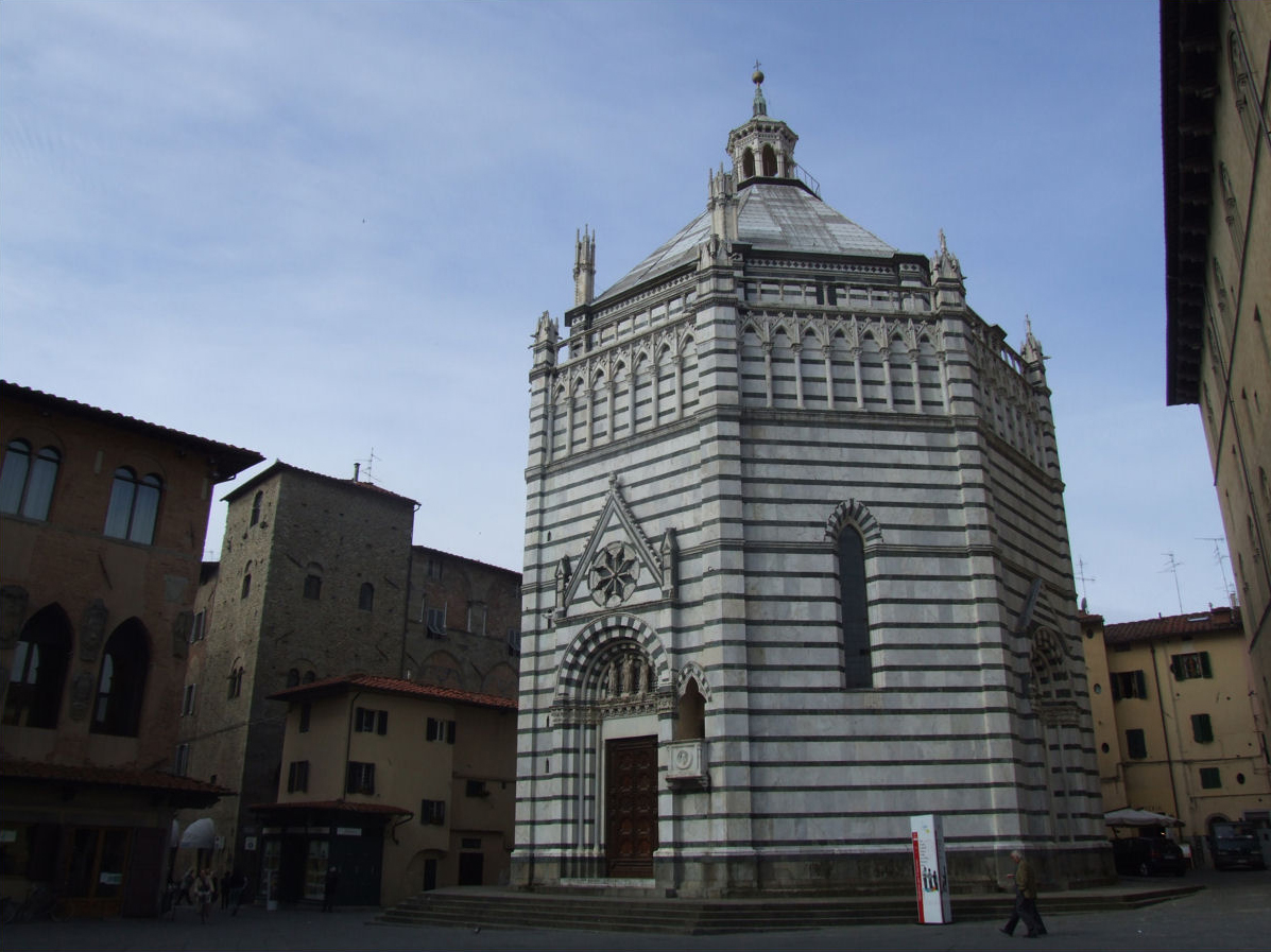 Cattedrale di San Zeno, Pistoia, Italy - Baptistry